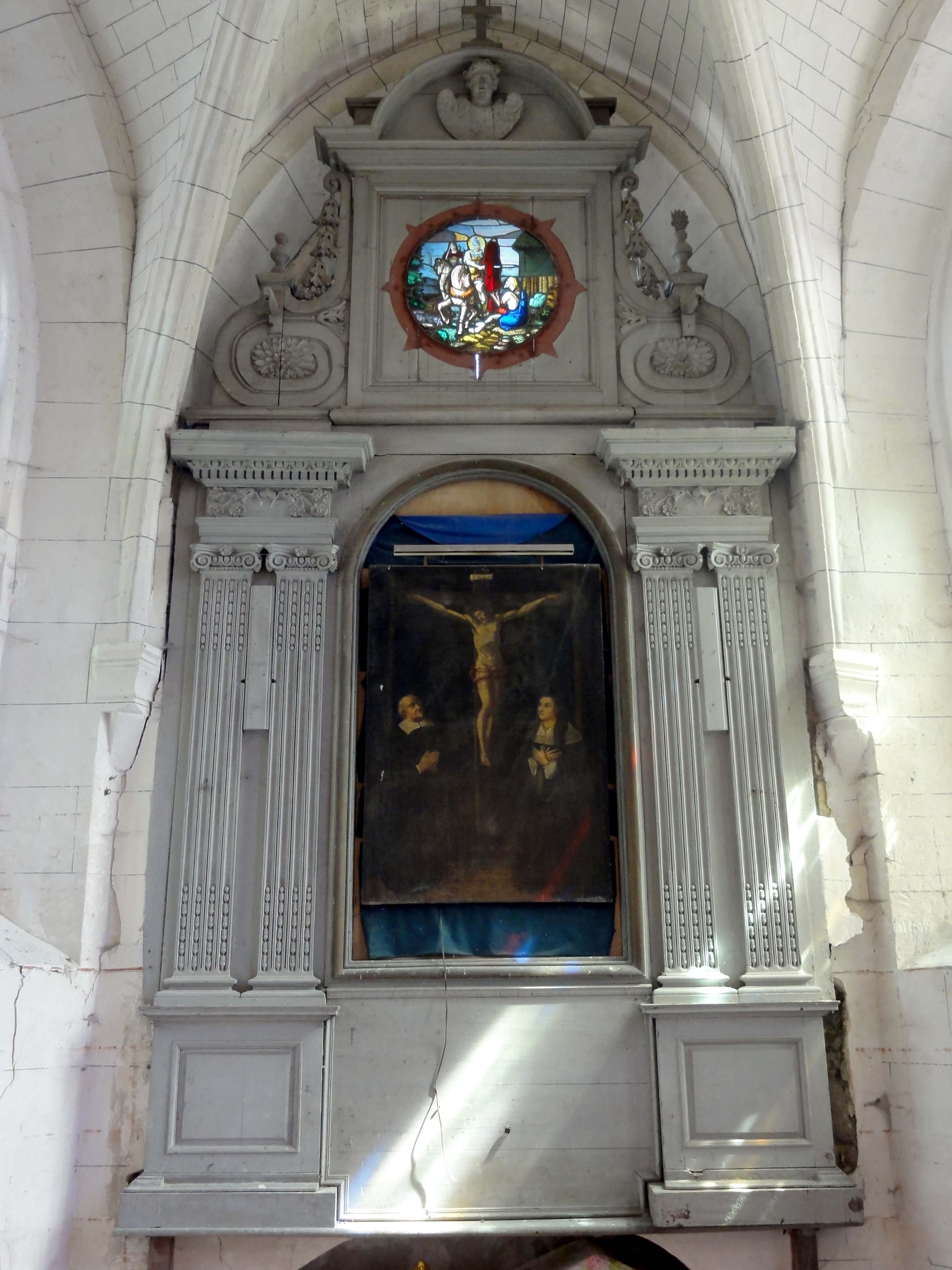 Mobilier de l'église (voir titre).